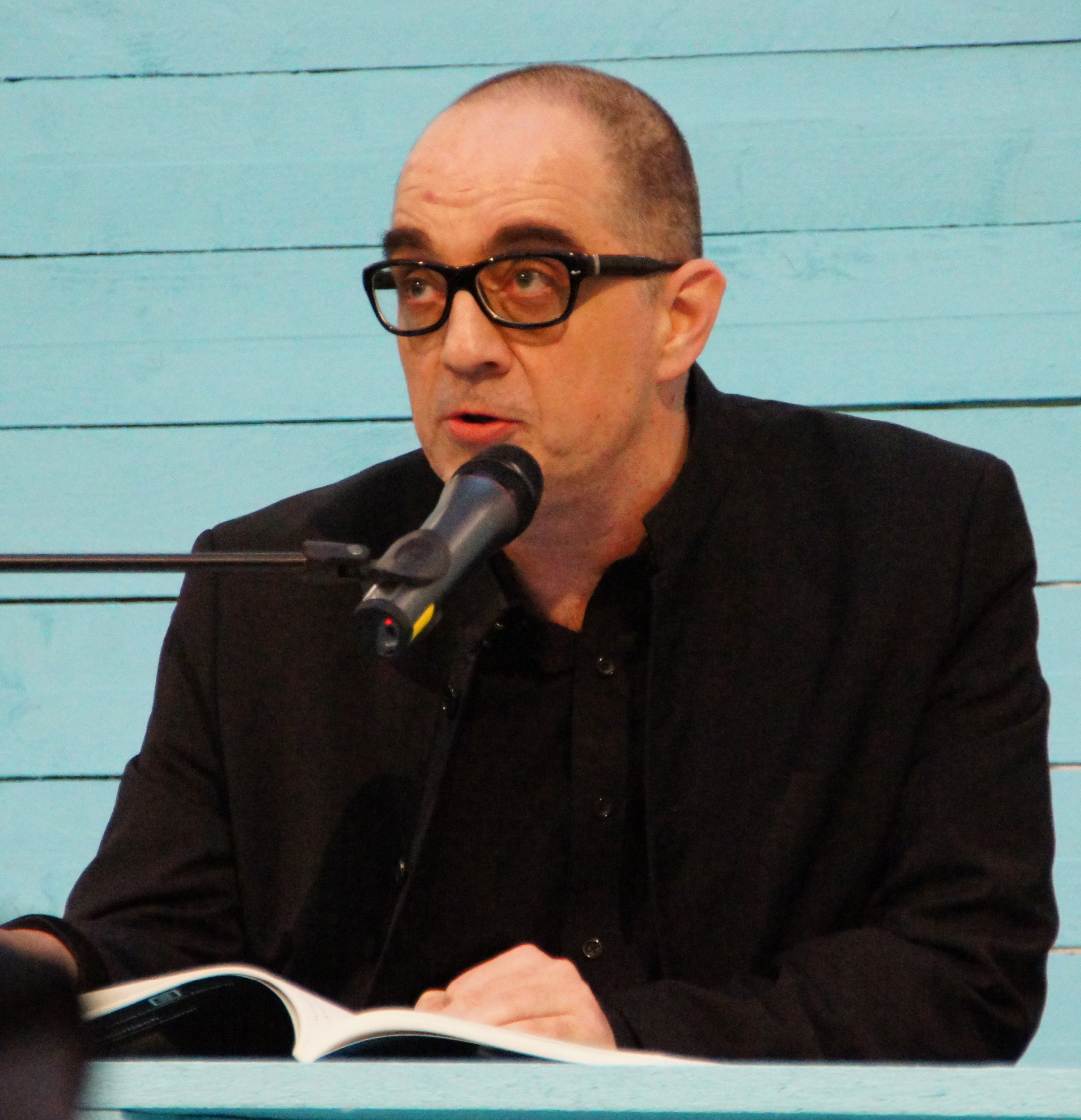 Unter dem Titel "Eine Versammlung kommt selten allein" lasen, anlässlich des 40. Jahrestages der Gründung, Lyriker und Lyrikerinnen der Grazer Autorinnen Autorenversammlung im "Salon für Kunstbuch im 21er Haus". Abgebildete Personen: S. Dateiname.